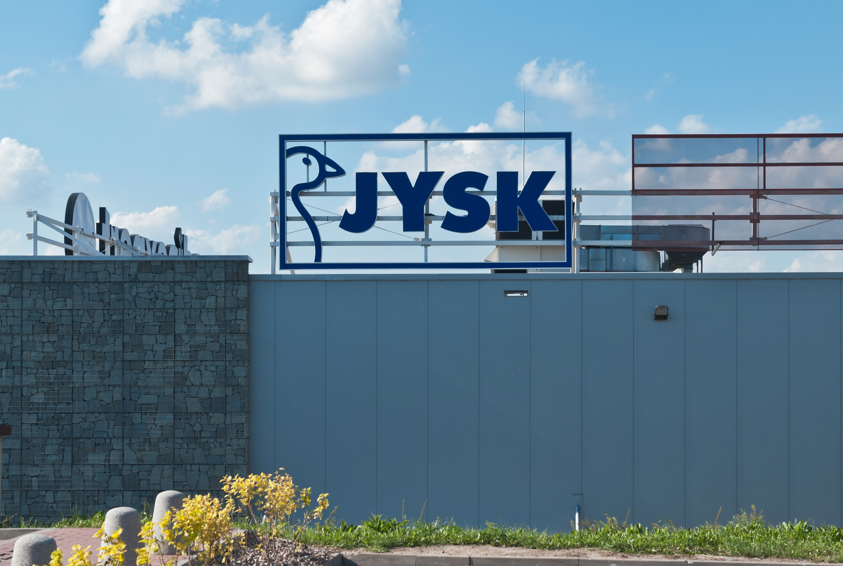 Kłodzko, galeria handlowa "Twierdza Kłodzko"